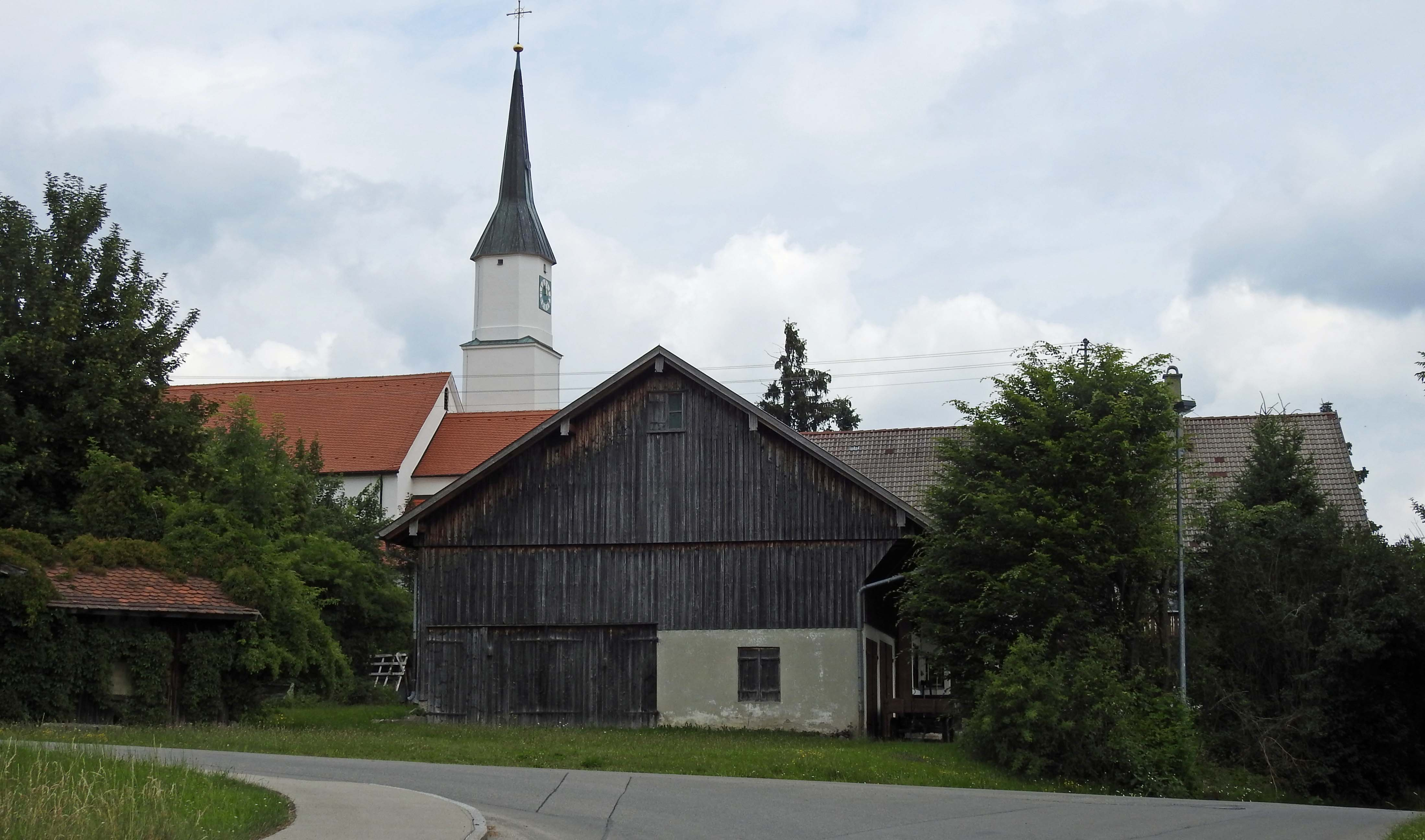 Südlicher Ortseingang von Westendorf (Allgäu)